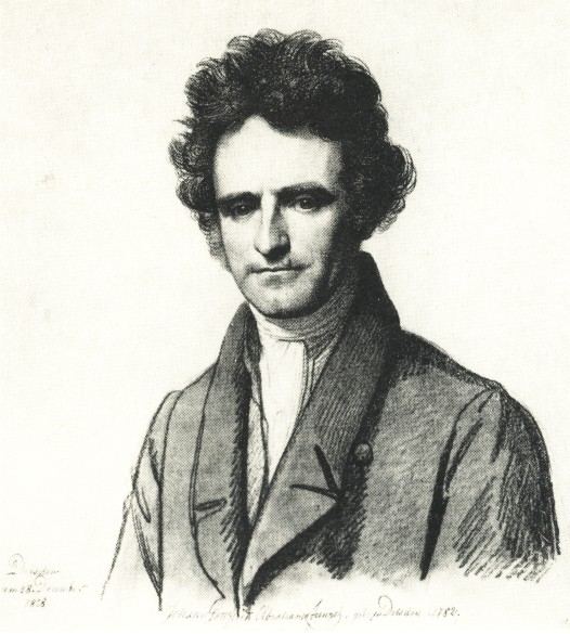 Porträt des Kupferstechers Johann Gottfried Abraham Frenzel